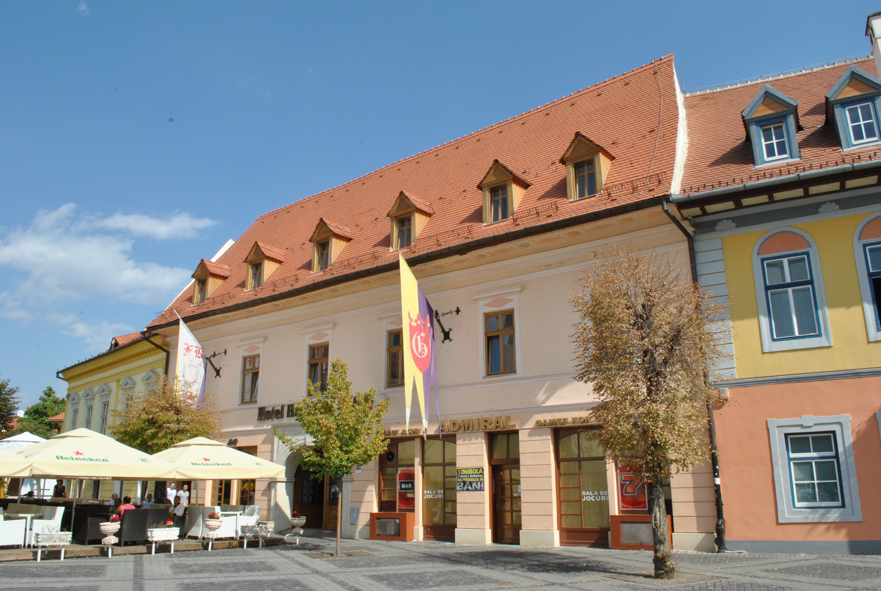 Casă, sec. XV - XVIII, transf. sec. XIX